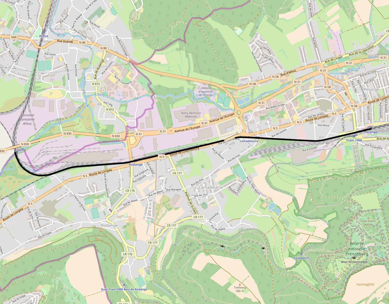 CFL line 6g, Pétange - Rodange (Aubange)